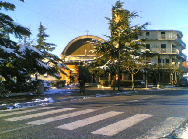 Scampitella: piazza libertà